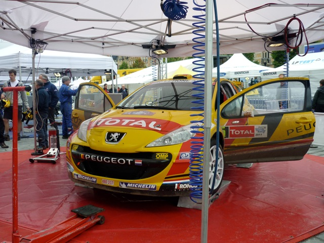 La Peugeot 207 S2000 de Thierry Neuville - IRC 2011